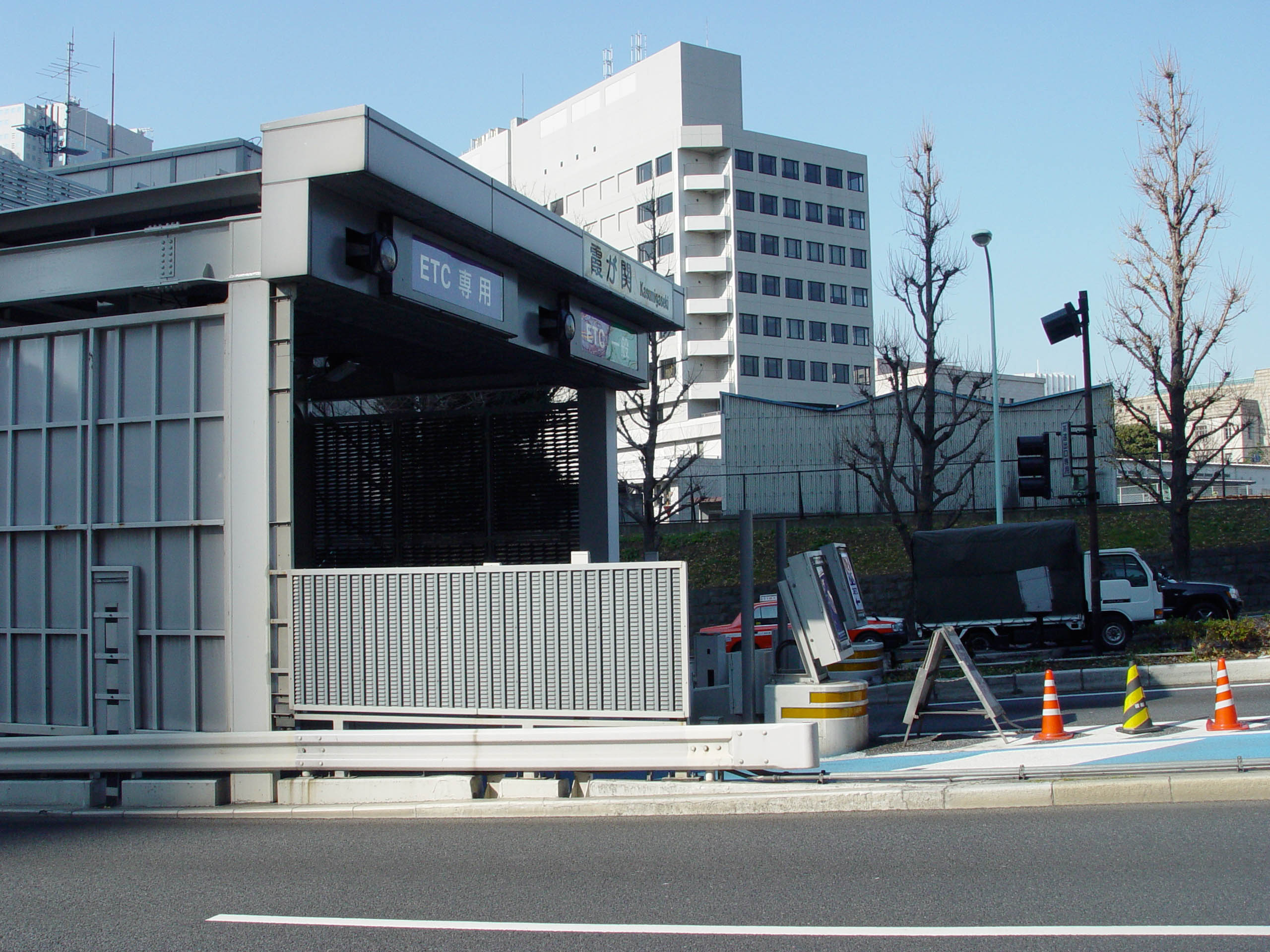 Kasumigaseki interchange 霞ヶ関インターチェンジ